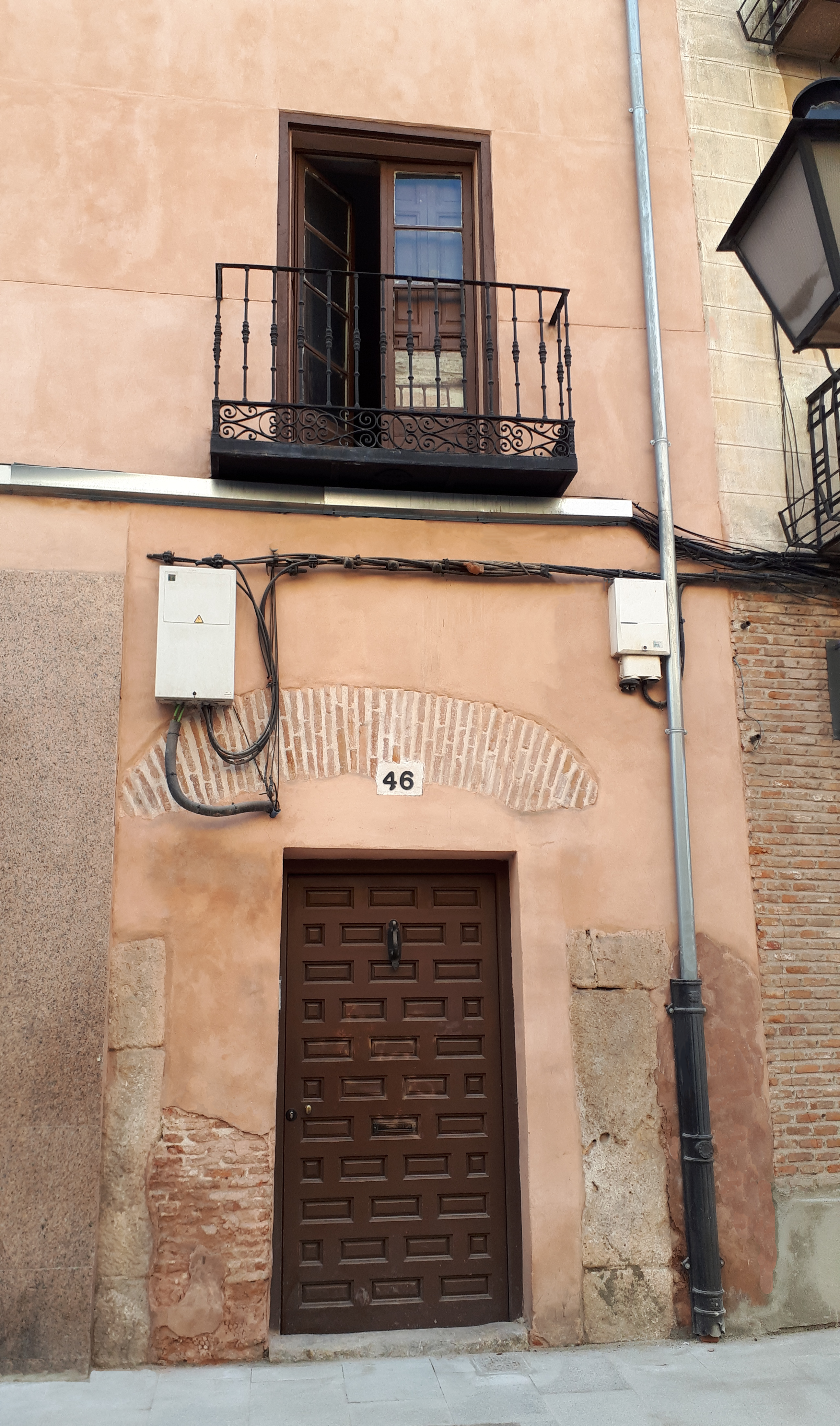 Portada del Colegio Menor de San Cosme y San Damián o "de Mena" de la Universidad de Alcalá. Fundado por Fernando de Mena en 1568, en la calle Libreros nº 46 de Alcalá de Henares.